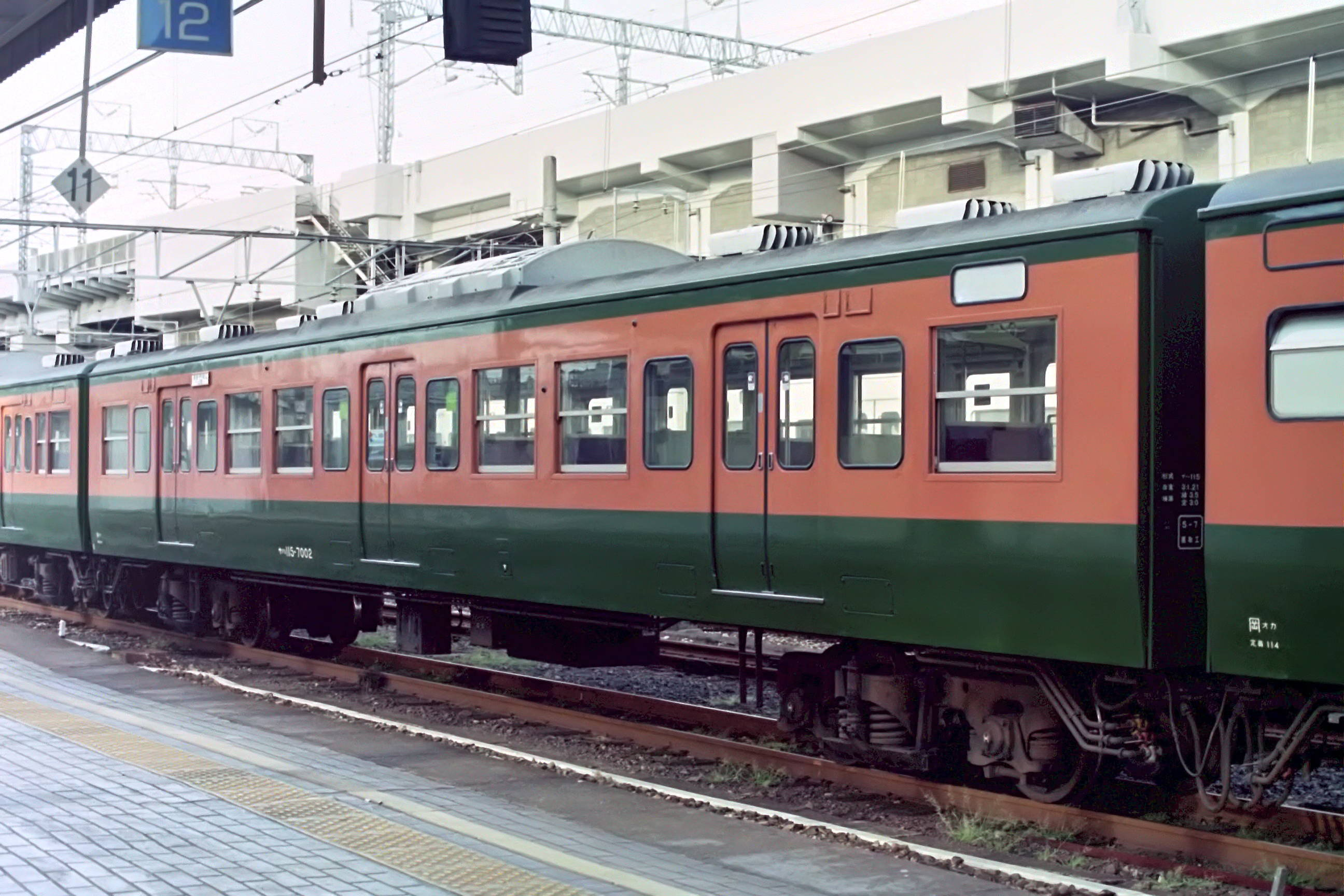 サハ115 7002 岡山駅